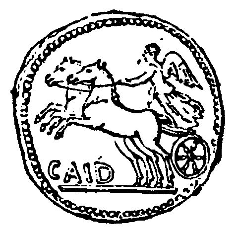 Bigatus (lat., af biga, tvespann), num., benämning på sådana fornromerska mynt, som på frånsidan visa bilderna af två hästar och en vagn med den bevingade segergudinnan (eller annan gudom) uti. De voro i bruk från puniska krigen till borgerliga krigen.